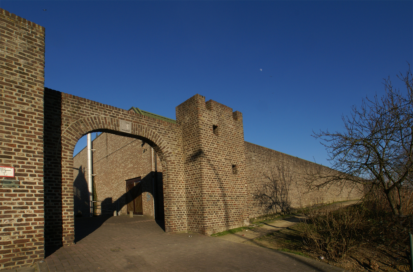 Stokkem (Belgium) Stadspoort - City Gate